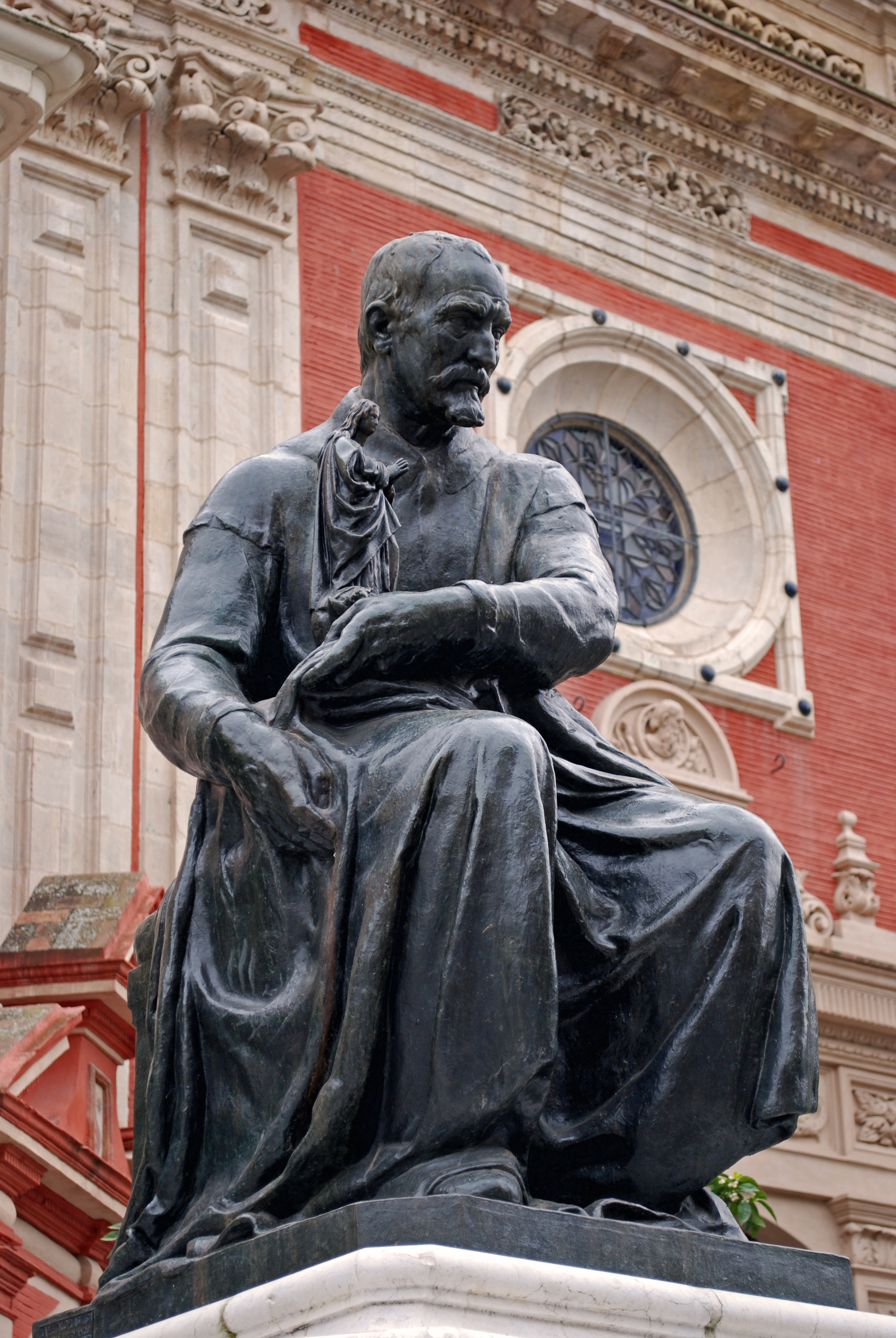 Monumento a Juan Martínez Montañés, en plaza del Salvador, Sevilla. Obra del escultor Agustín Sánchez Cid. (1924)